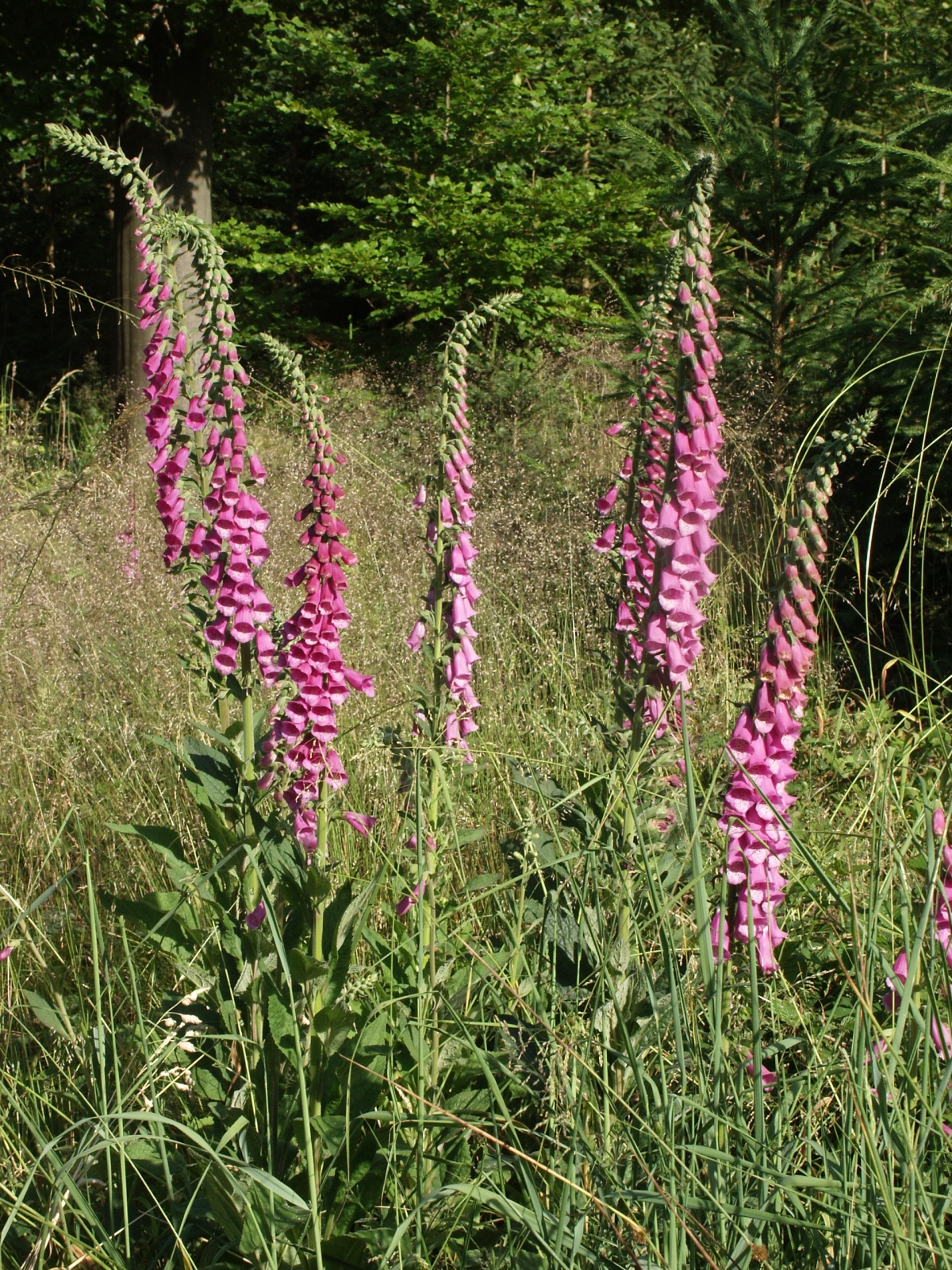 Digitalis purpurea, Schwäbisch-Fränksiche Waldberge, Deutschland